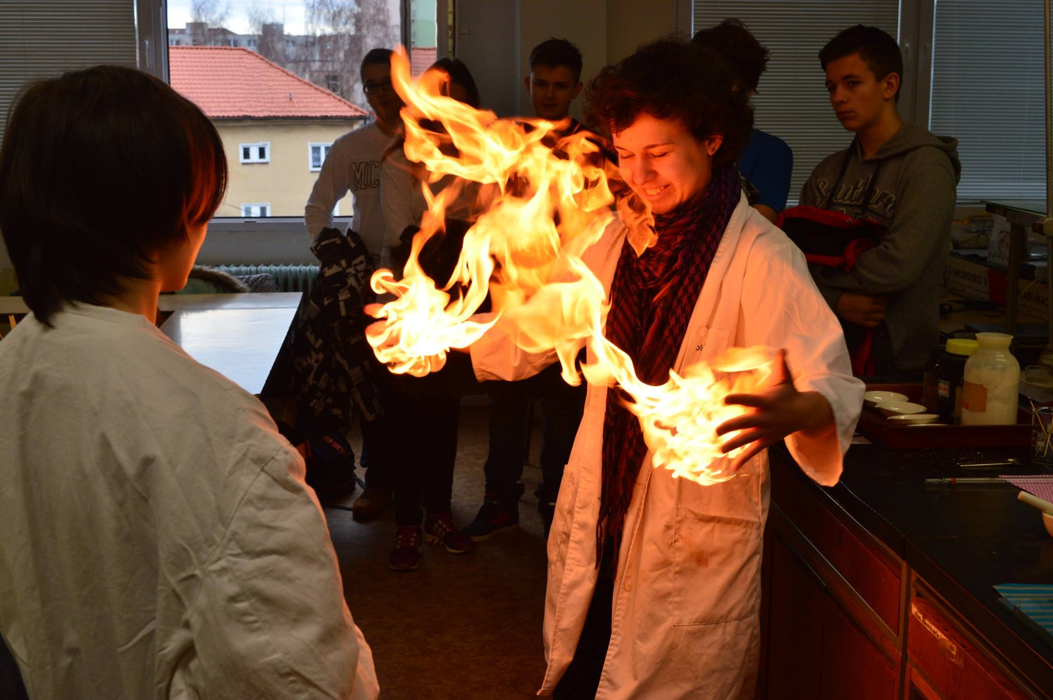 Horenie propán-butánu